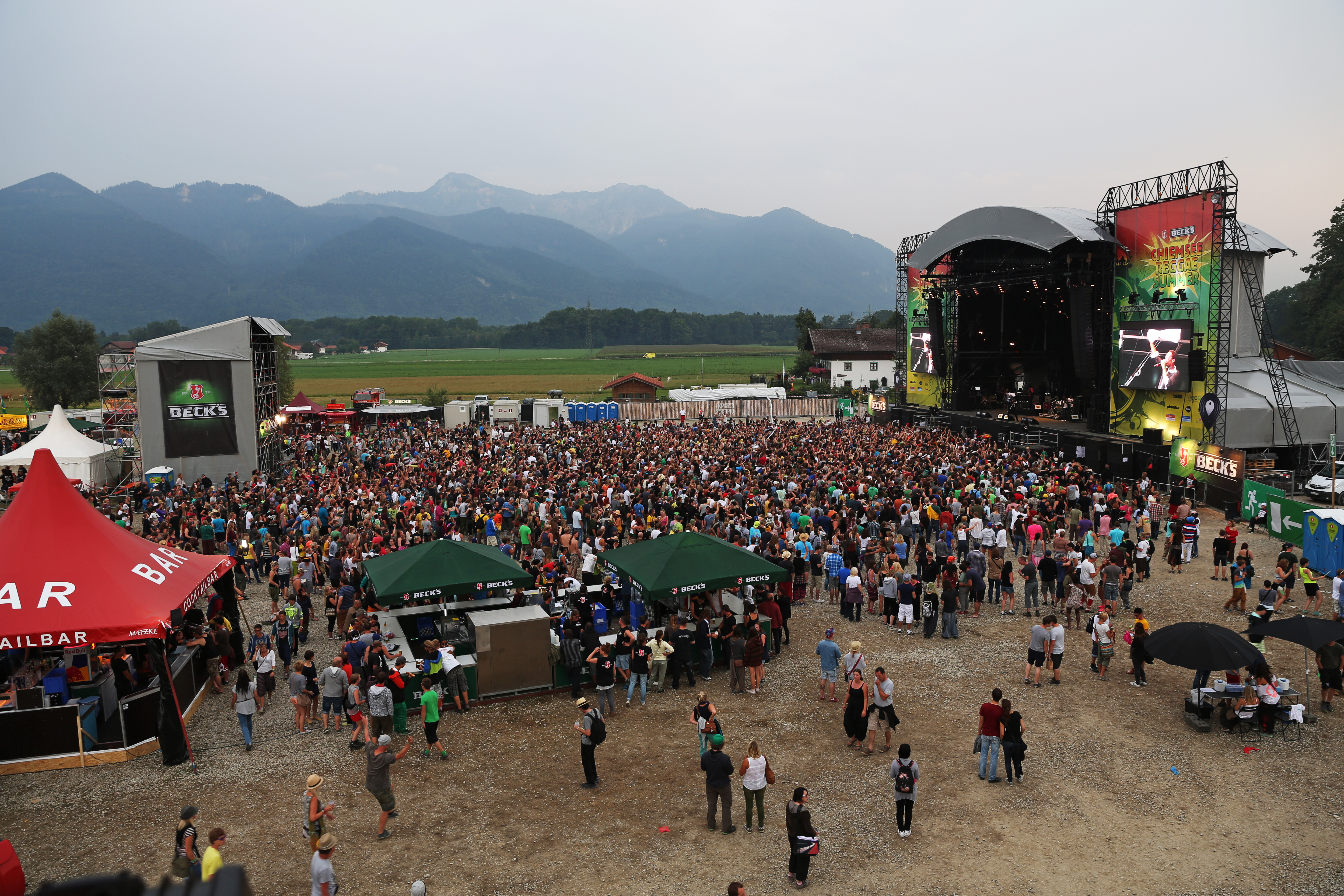 Blick auf die Hauptbühne des Chiemsee Reggae Summer 2013 Festivals, im Hintergrund die Chiemgauer Alpen Festivalsommer This photo was created with the support of donations to Wikimedia Österreich and Wikimedia Deutschland in the context of the CPB project "Festival Summer".